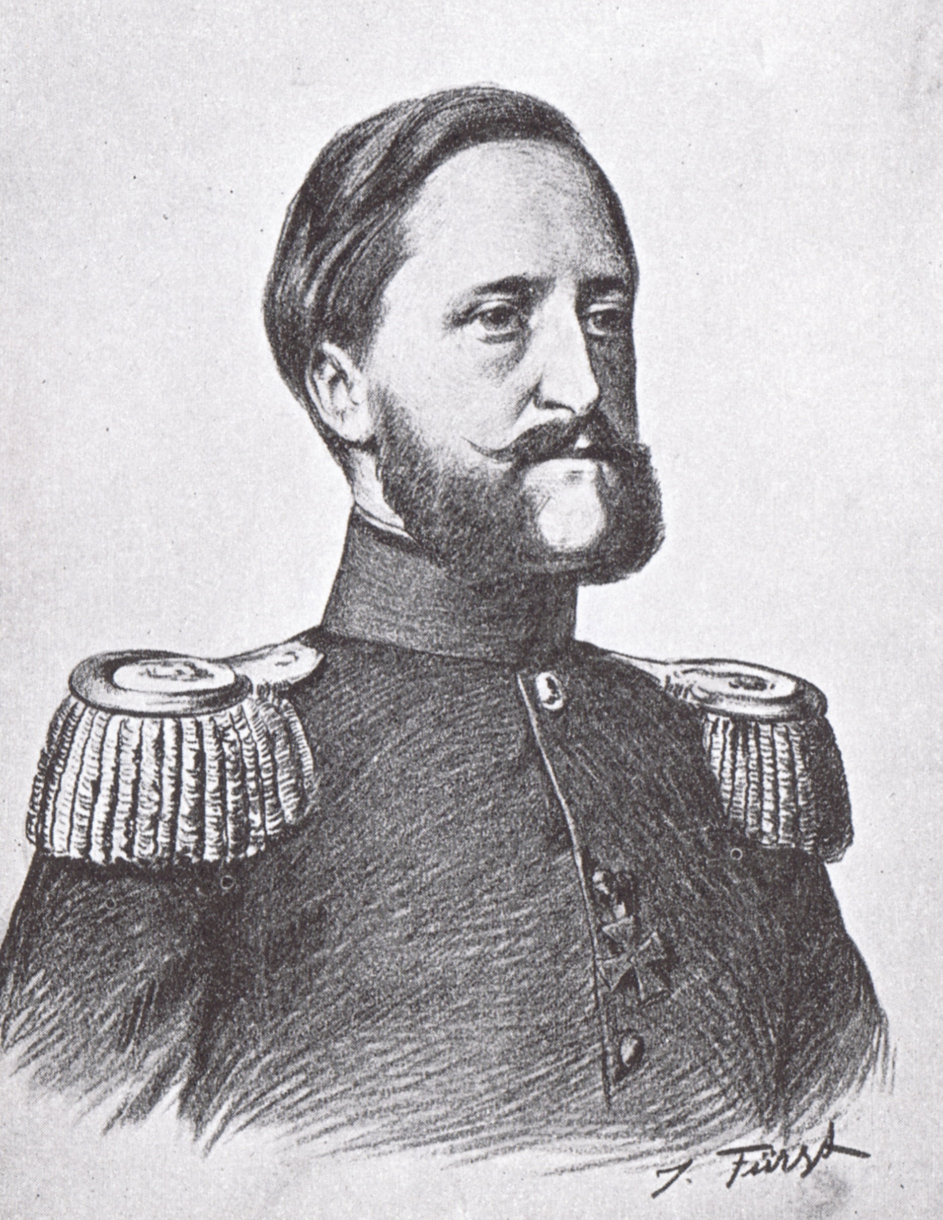 Friedrich VIII. von Schleswig-Holstein, Zeichnung von Julius Fürst um 1895.